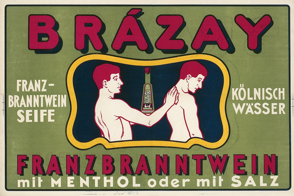 Plakt für Produkte von Brázay: Franzbranntwein, Seite, Kölnisch Wasser mit Menthol oder mit Salz Österreich. Anonymer Entwurf unter Verwendung eines Motives von Hellmann Mosonyi-Pfeiffer, ca. 1920, kein Druckvermerk. Größe circa 63 cm x 95 cm.